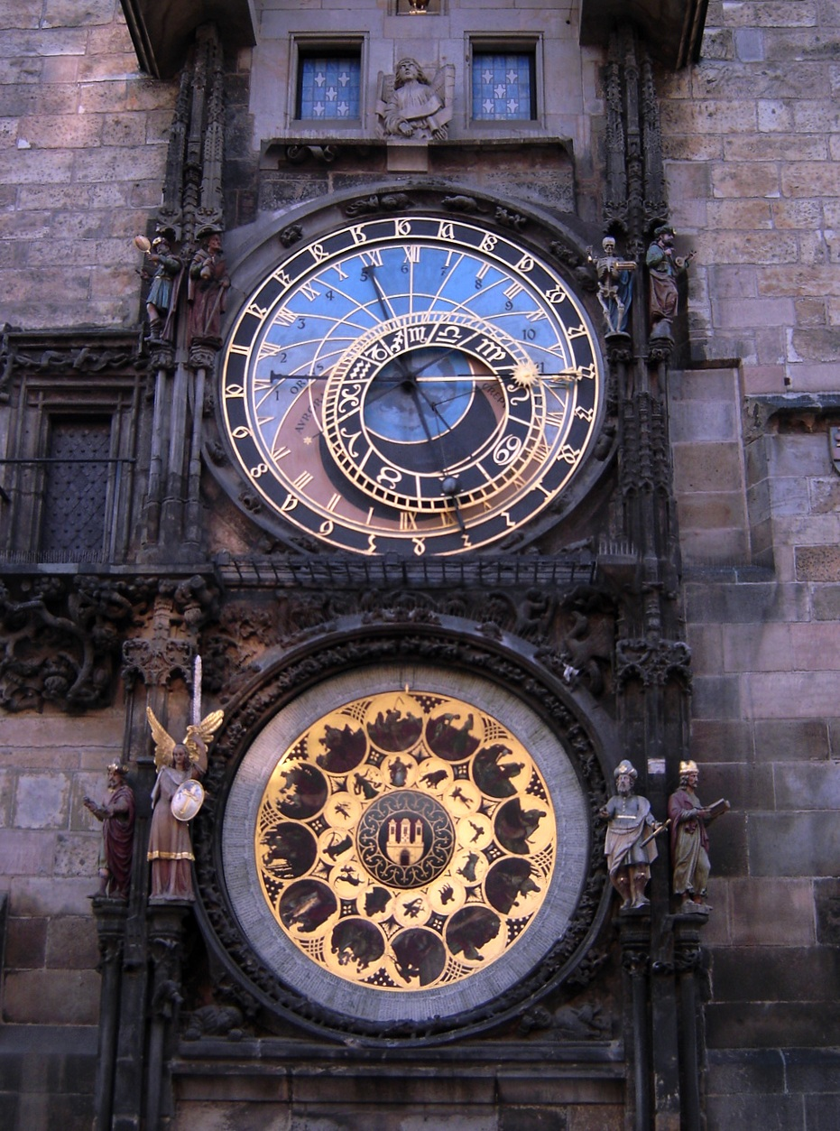 De astronomische klok aan het oude stadhuis van Praag. Van gebruiker Ra-smit. Categorie:Afbeelding techniek